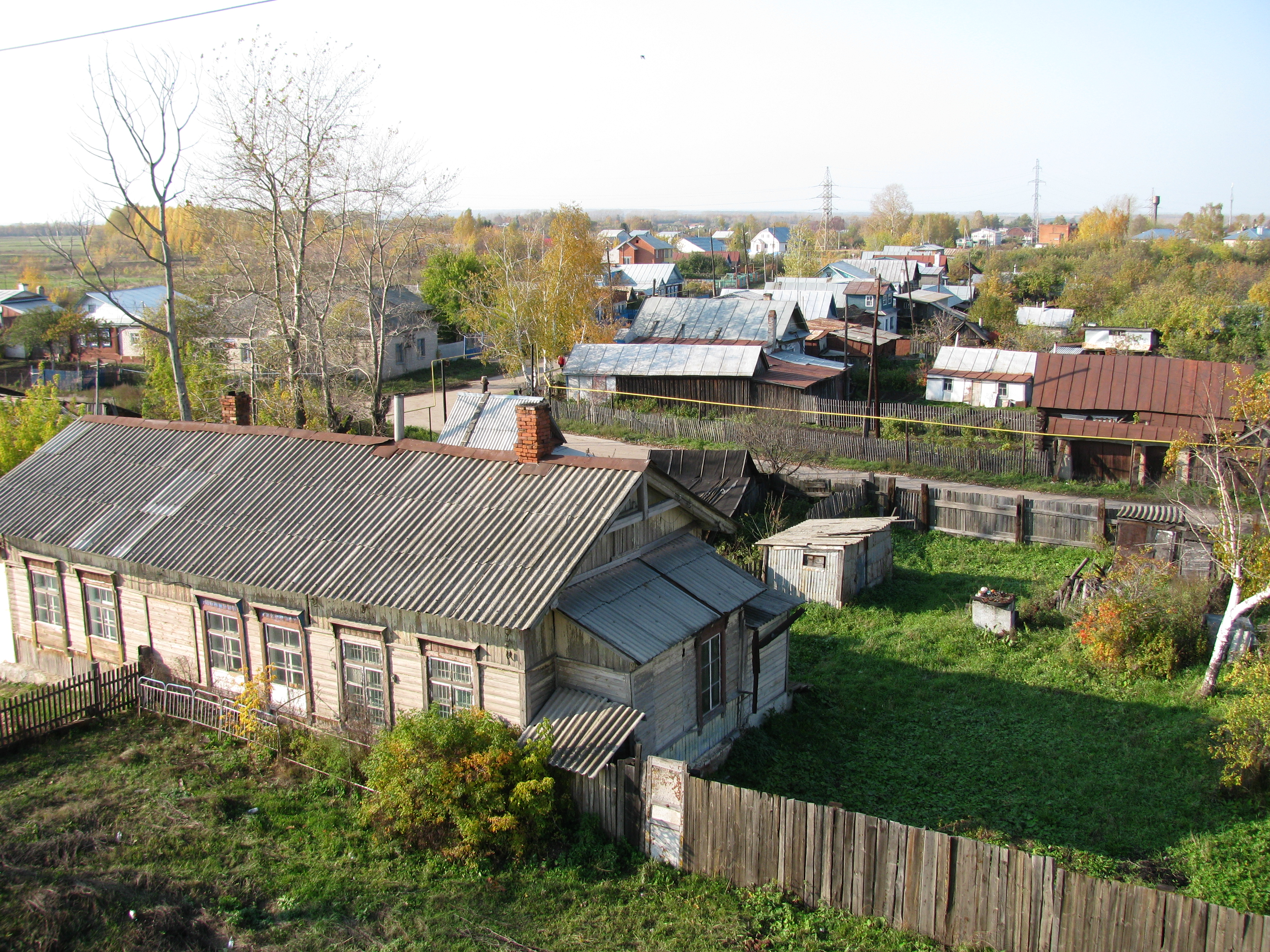 Тюрлема около станции